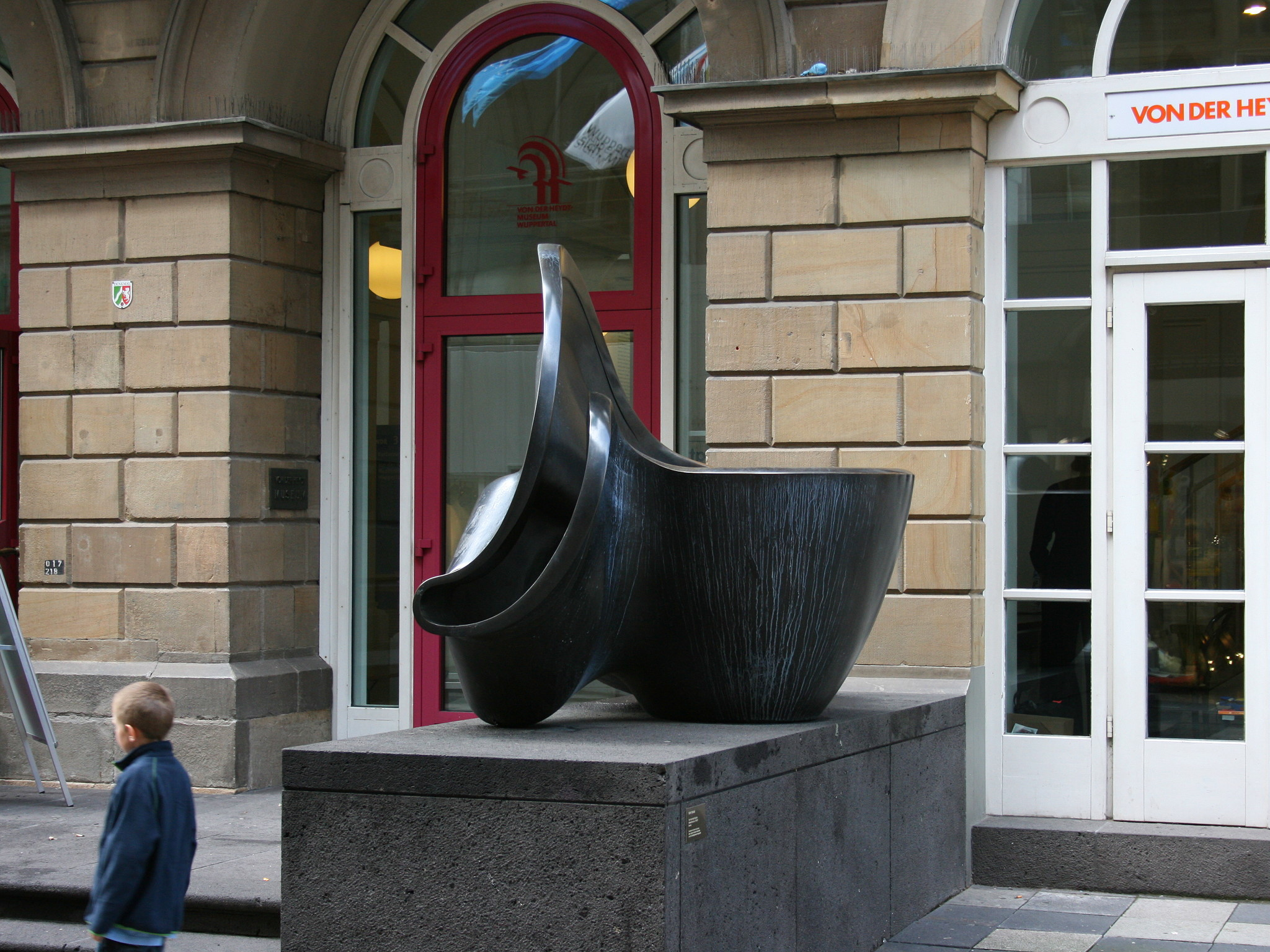 Von-der-Heydt-Museum in Wuppertal-Elberfeld, Tony Cragg: Early Forms - Mörser/Flasche